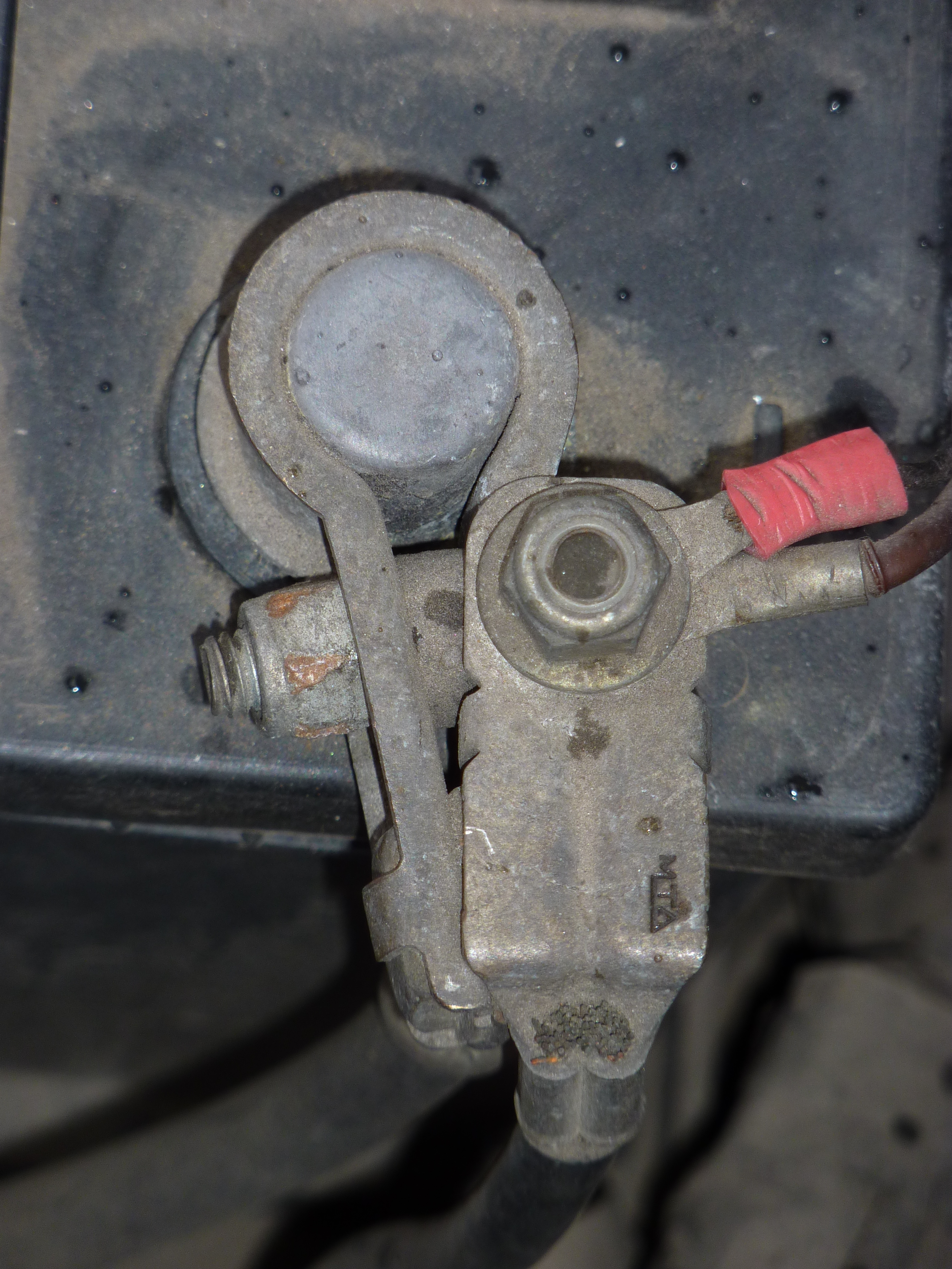 akumulator samochodowy zainstalowany w samochodzie osobowym Fiat Siena: zacisk ujemny